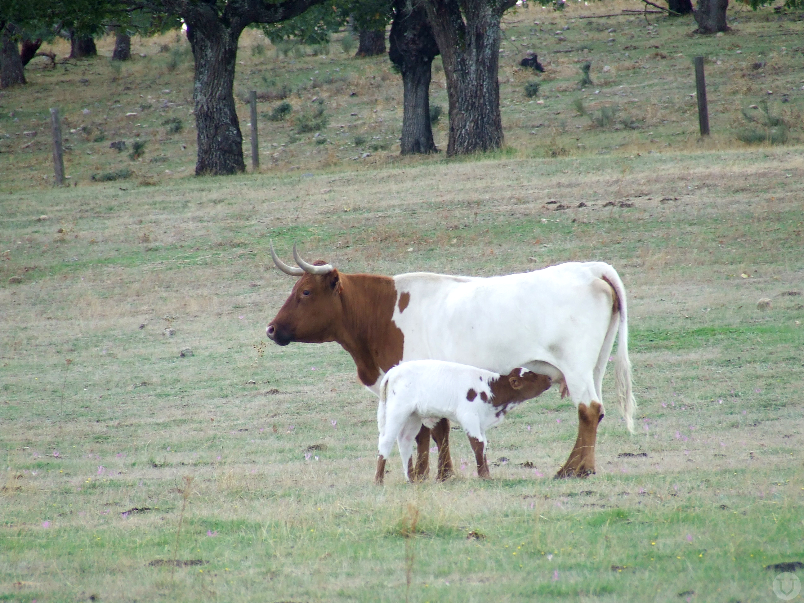 Vaca berrenda en colorado dando de mamar a su becerro. Fotografía tomada en la Dehesa de Valdelazarza (Salamanca)